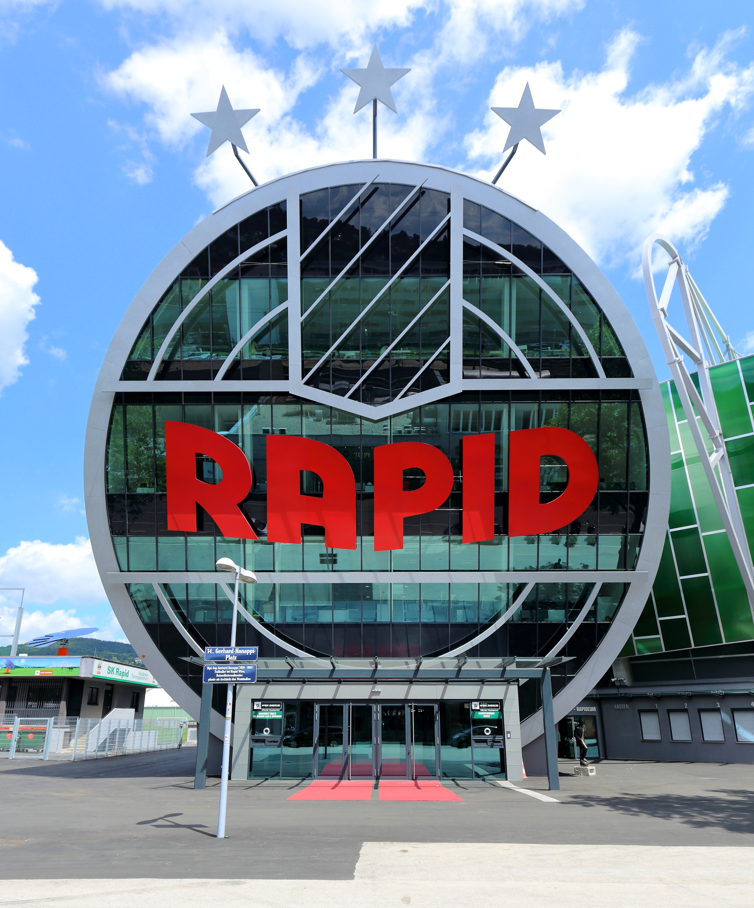 Das Rapid-Wappen am Allianz-Stadion in Hütteldorf, ein Bezirksteil des 14. Wiener Gemeindebezirkes Penzing. Das Wappen mit einem Durchmesser von rd. 20 Meter und einer Schrifthöhe von ca. 4 Meter nimmt die ganze Stirnseite der sogenannten „Röhre“ ein.